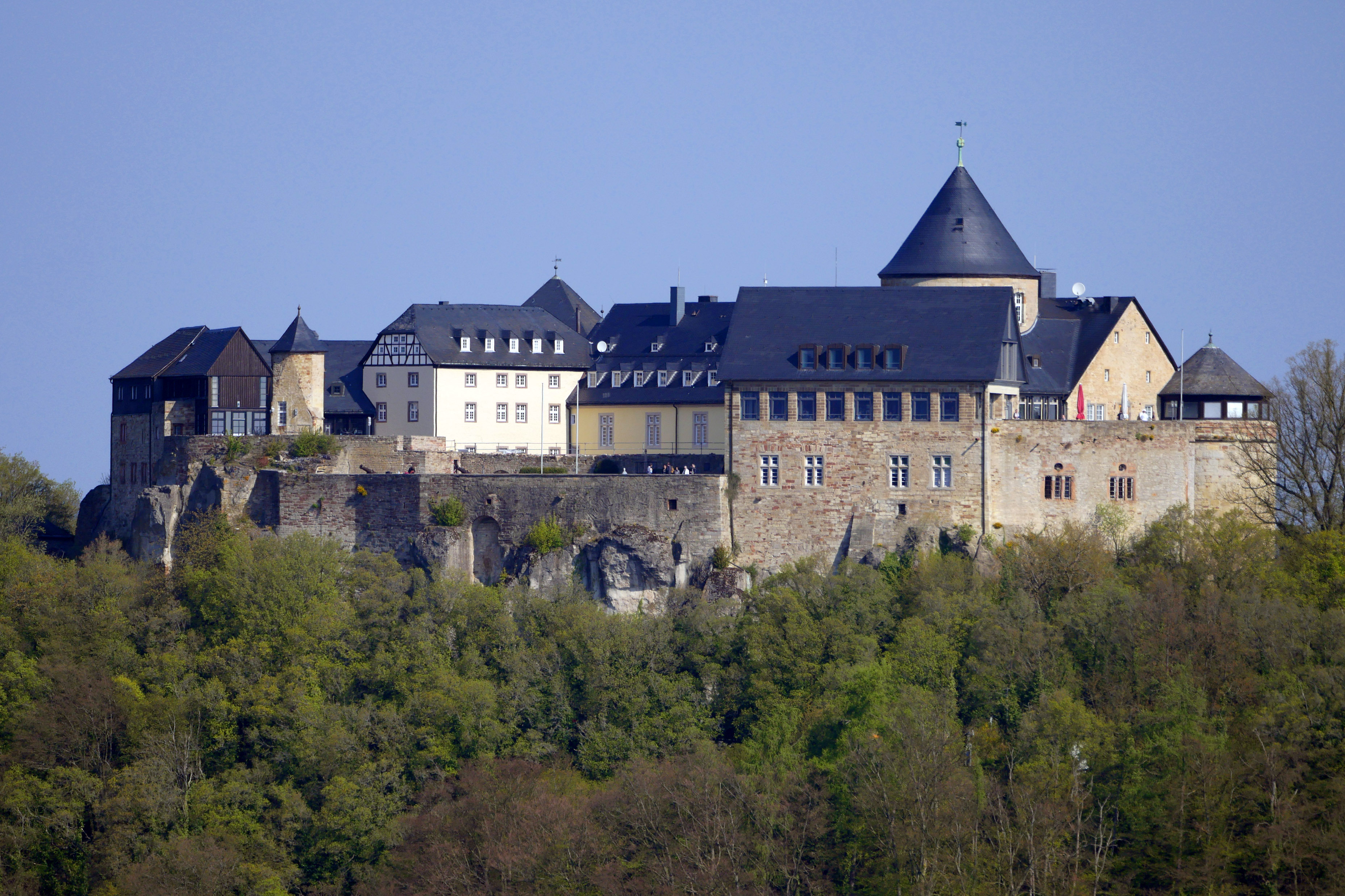 Schloss Waldeck am Edersee von der 1,5 Kilometer entfernten Kanzel aus gesehen.